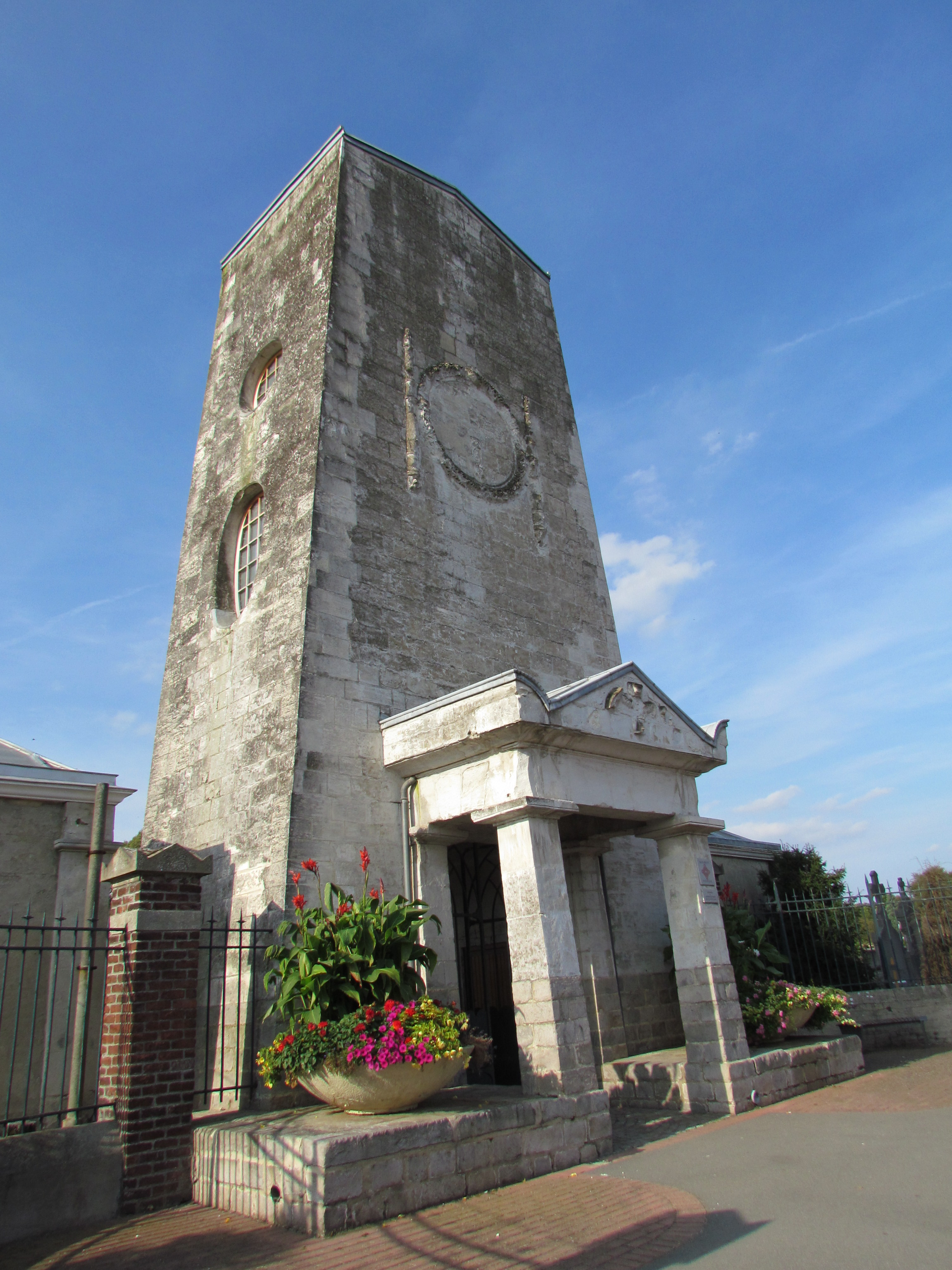 Entrée du cimetière de Seclin (Nord, France) .